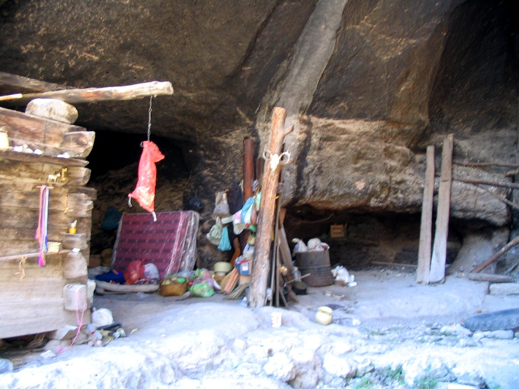 Hábitat en una cueva de una familia taraumara desplazada de la comunidad en la reserva aborigen de Chihuahua, México.